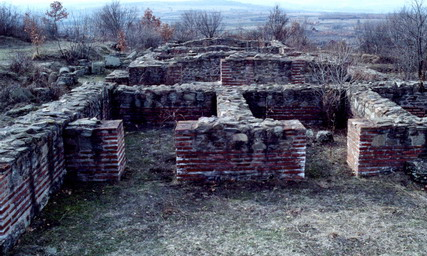 lokalitet caricin grad,autor fotografije Gasha